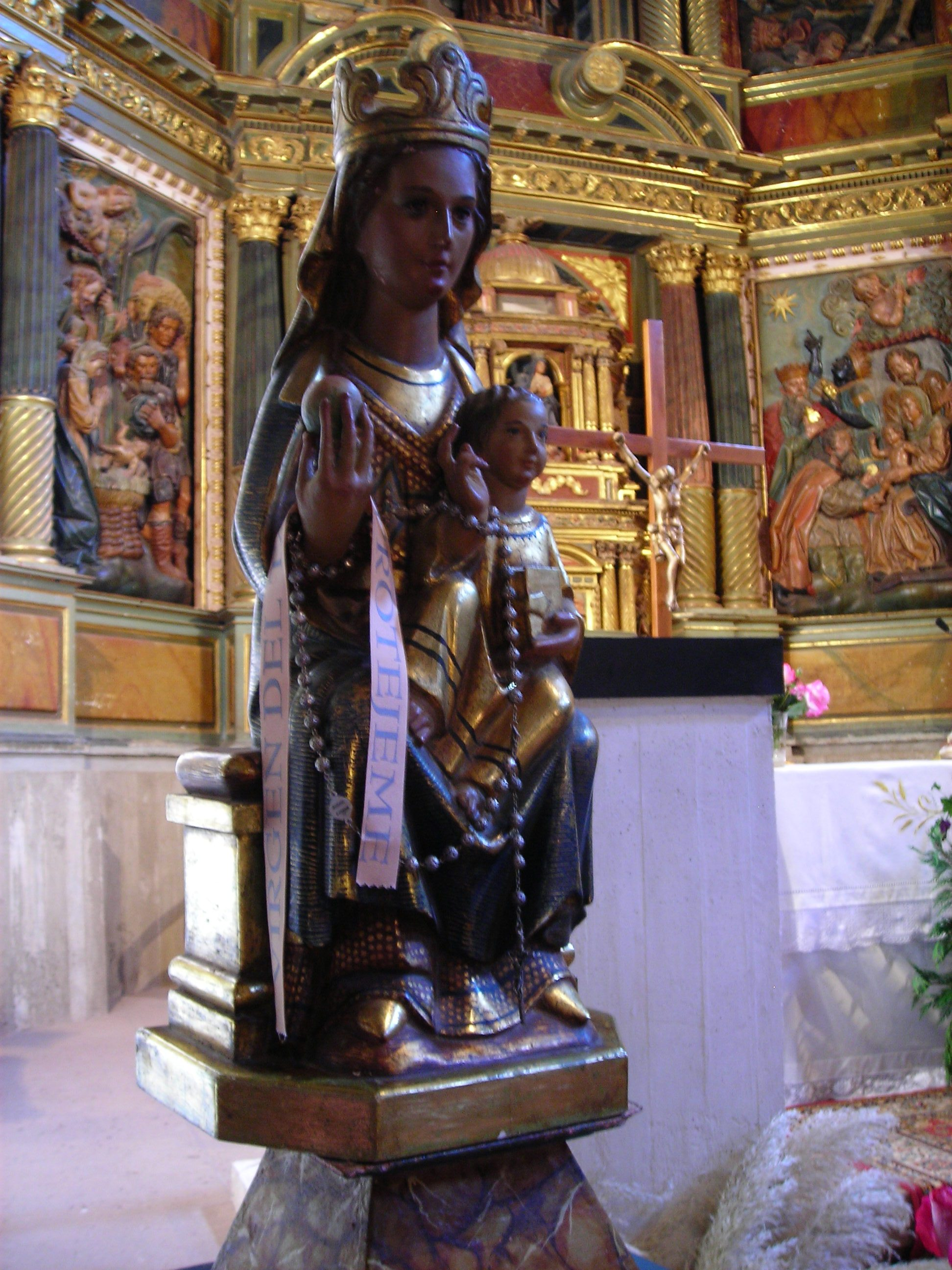 Virgen del Tajo (Camprovín).